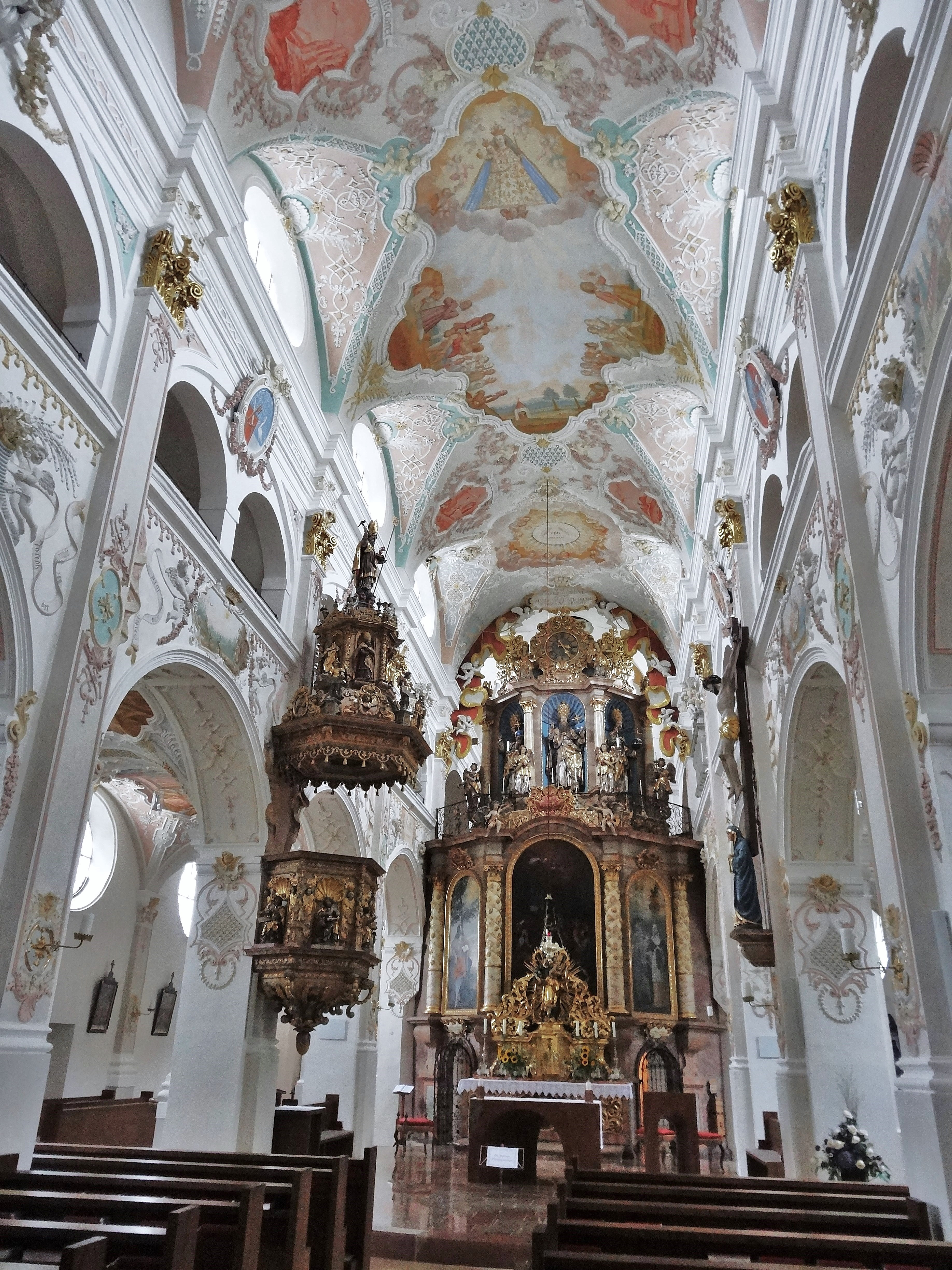 Innenansicht der Wallfahrts- und Pfarrkirche Weihenlinden